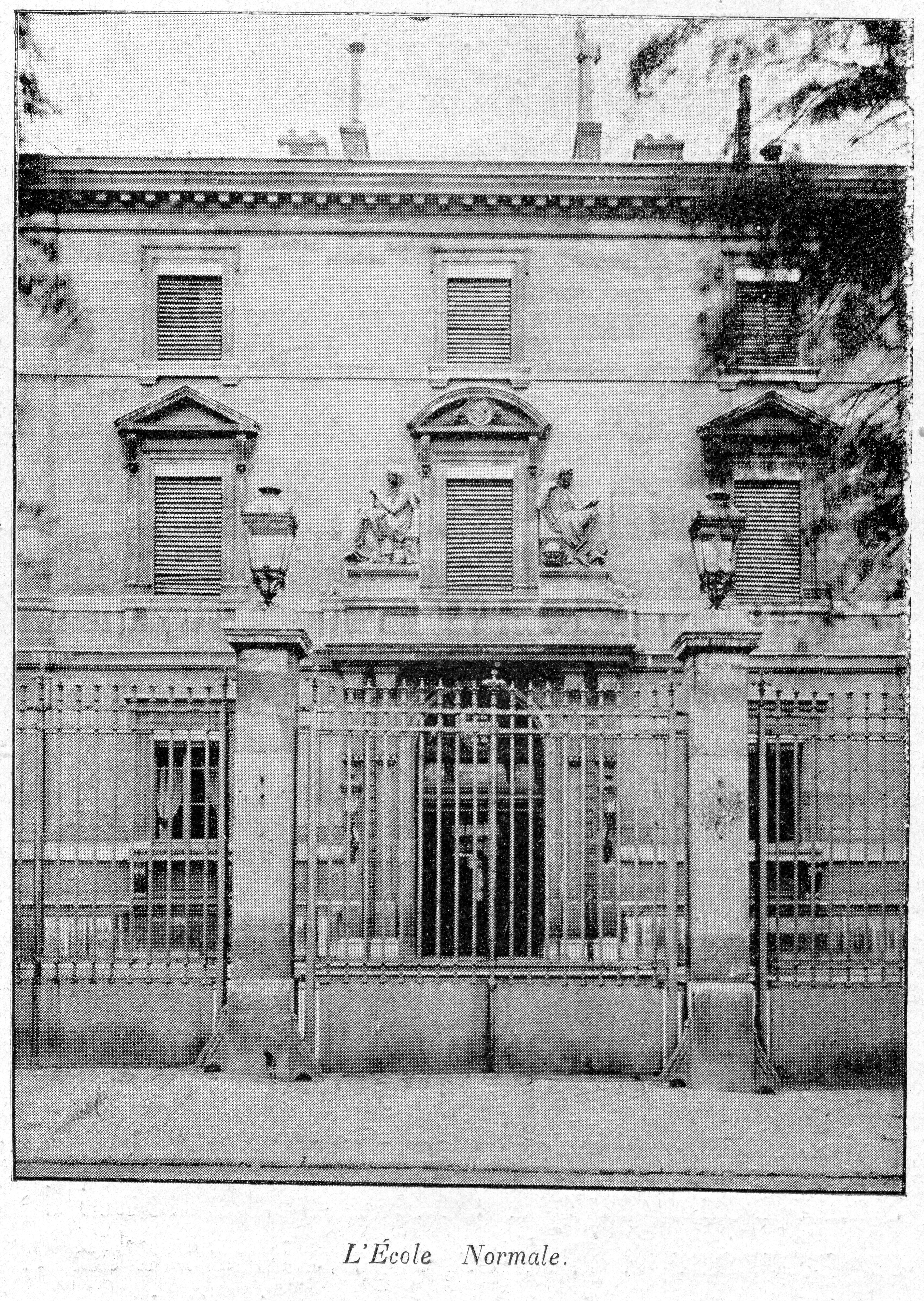 Clément Maurice Paris en plein air, BUC, 1897, L'École Normale